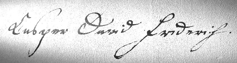 Signatur des Malers Caspar David Friedrich